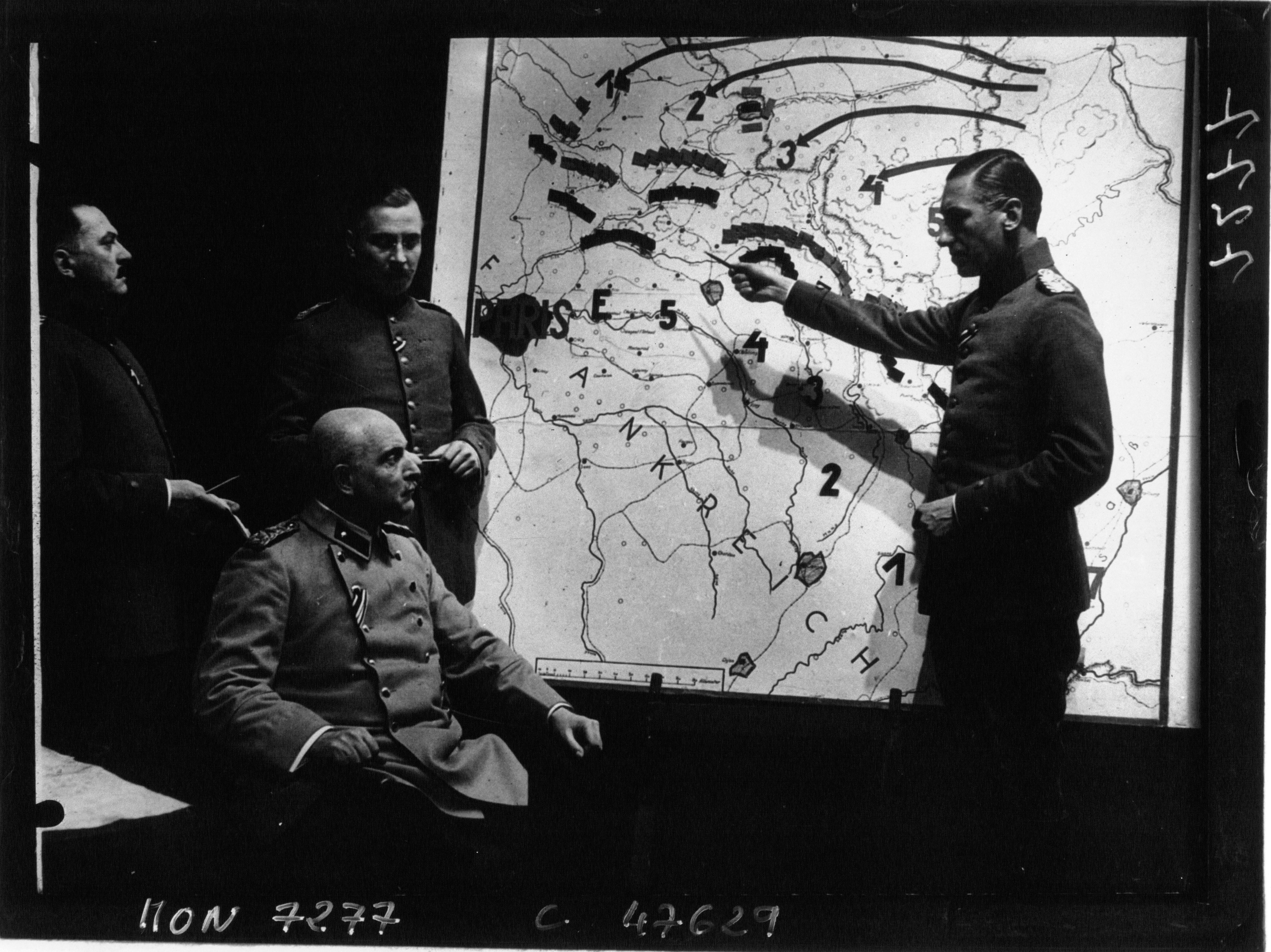 Une scène de la pièce La bataille de la Marne jouée à Berlin : le général von Moltke assis (agence photo Robert Sennecke Internationaler Illustrations Verlag, diffusé à Paris par l'Agence Mondial).